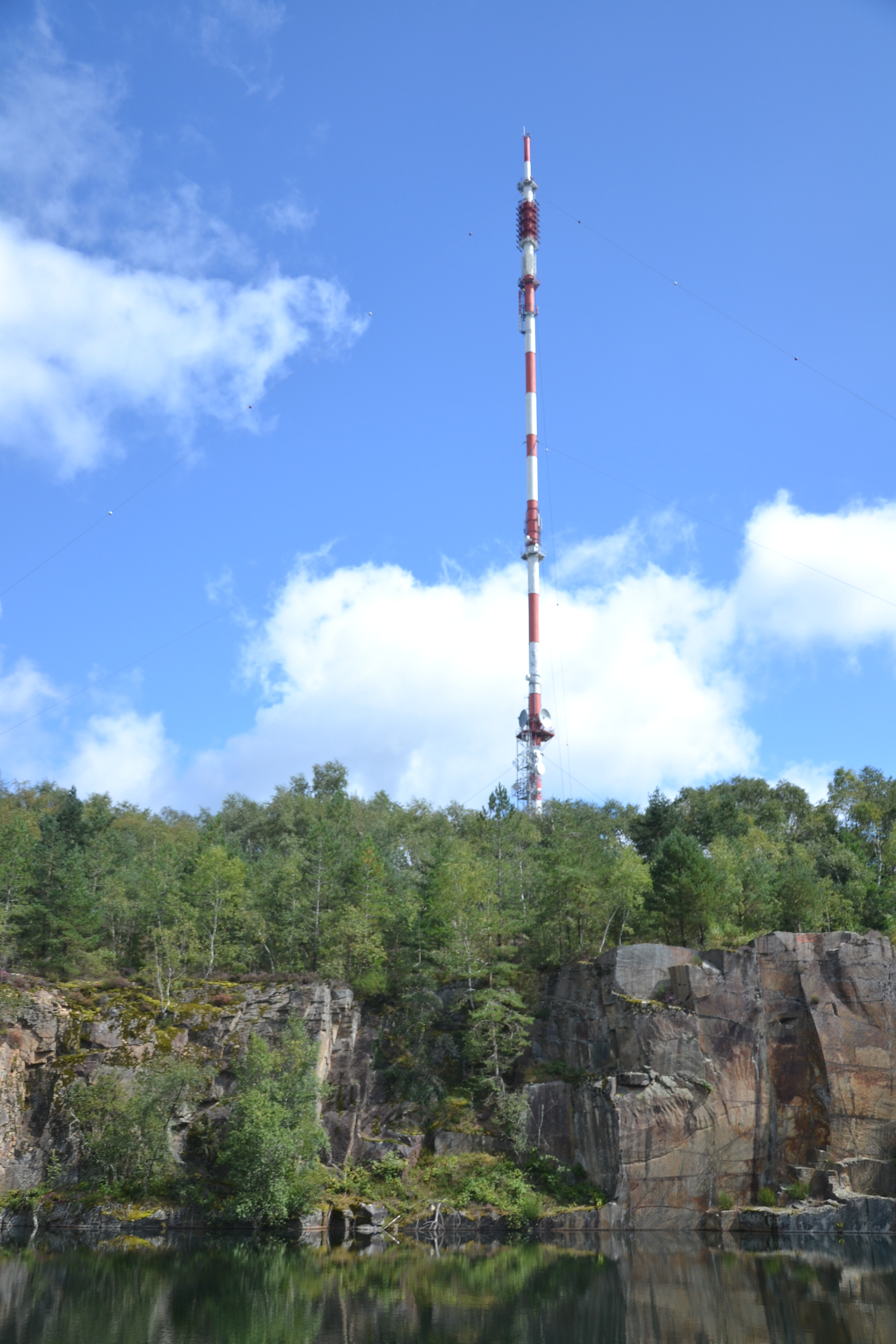 Anciennes carrières de granite du Maupuy (Saint-Léger-le-Guérétois, Creuse, France).